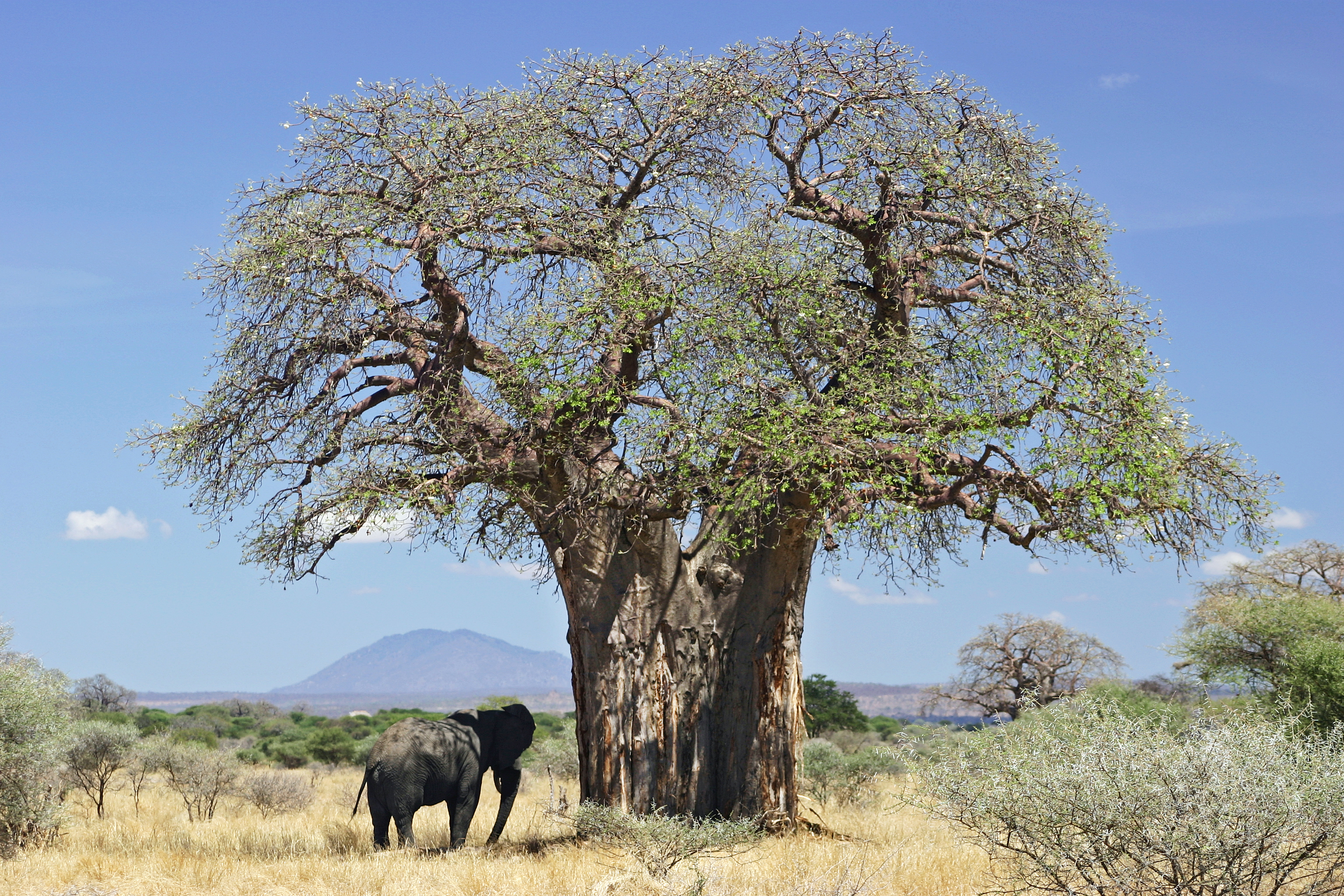 Baobab (Adansonia digitata) and elephant, Tanzania